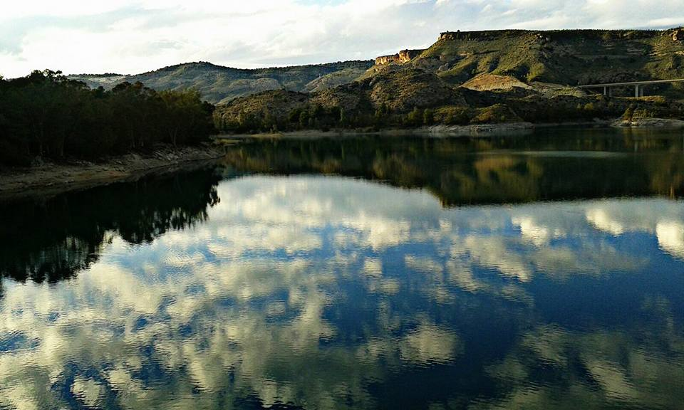 Pantano de la Cierva.